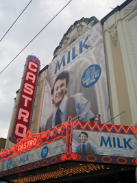 Castro-nov08